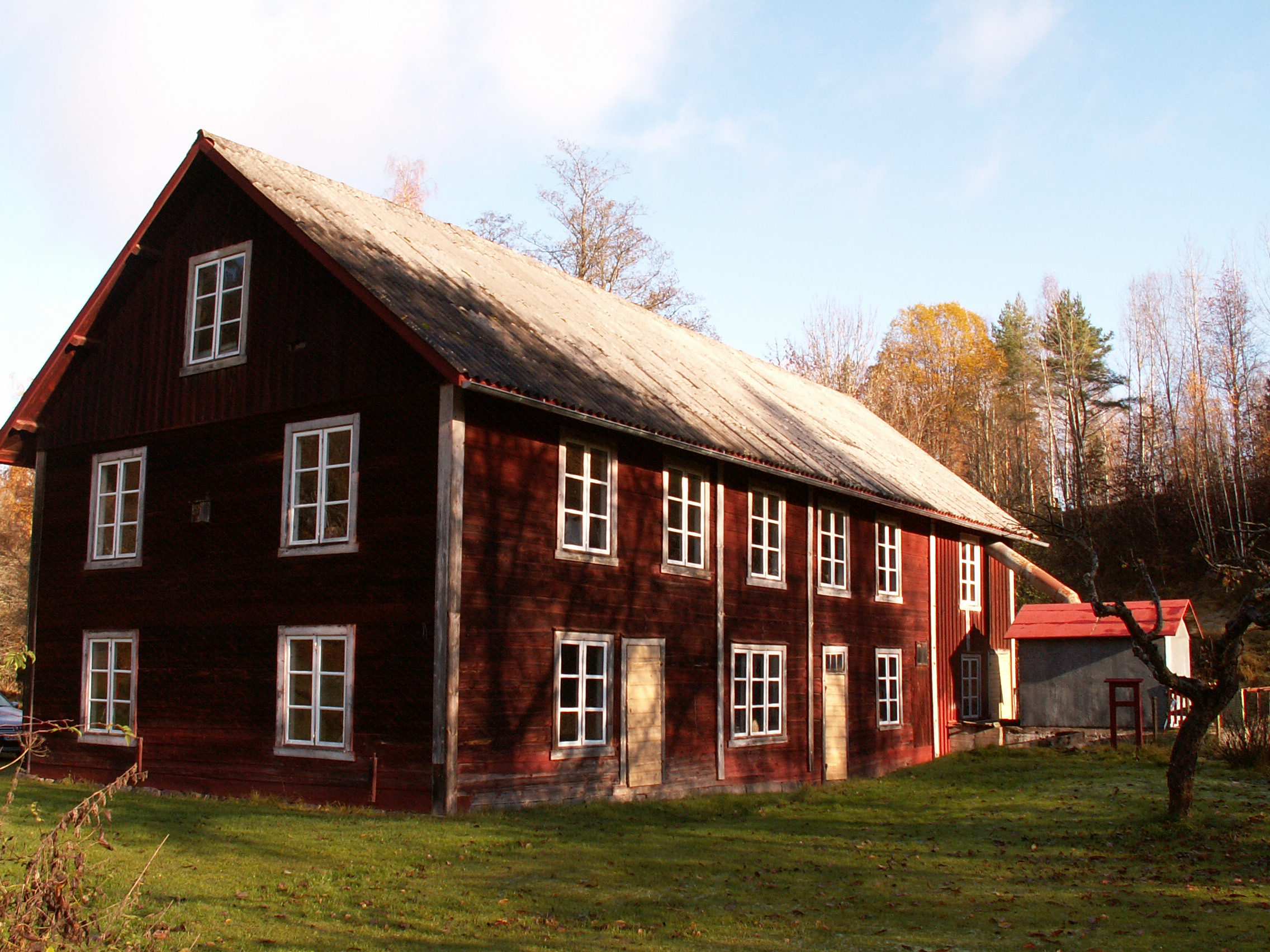 Kölefors vaddfabrik. Kinda, Kisa